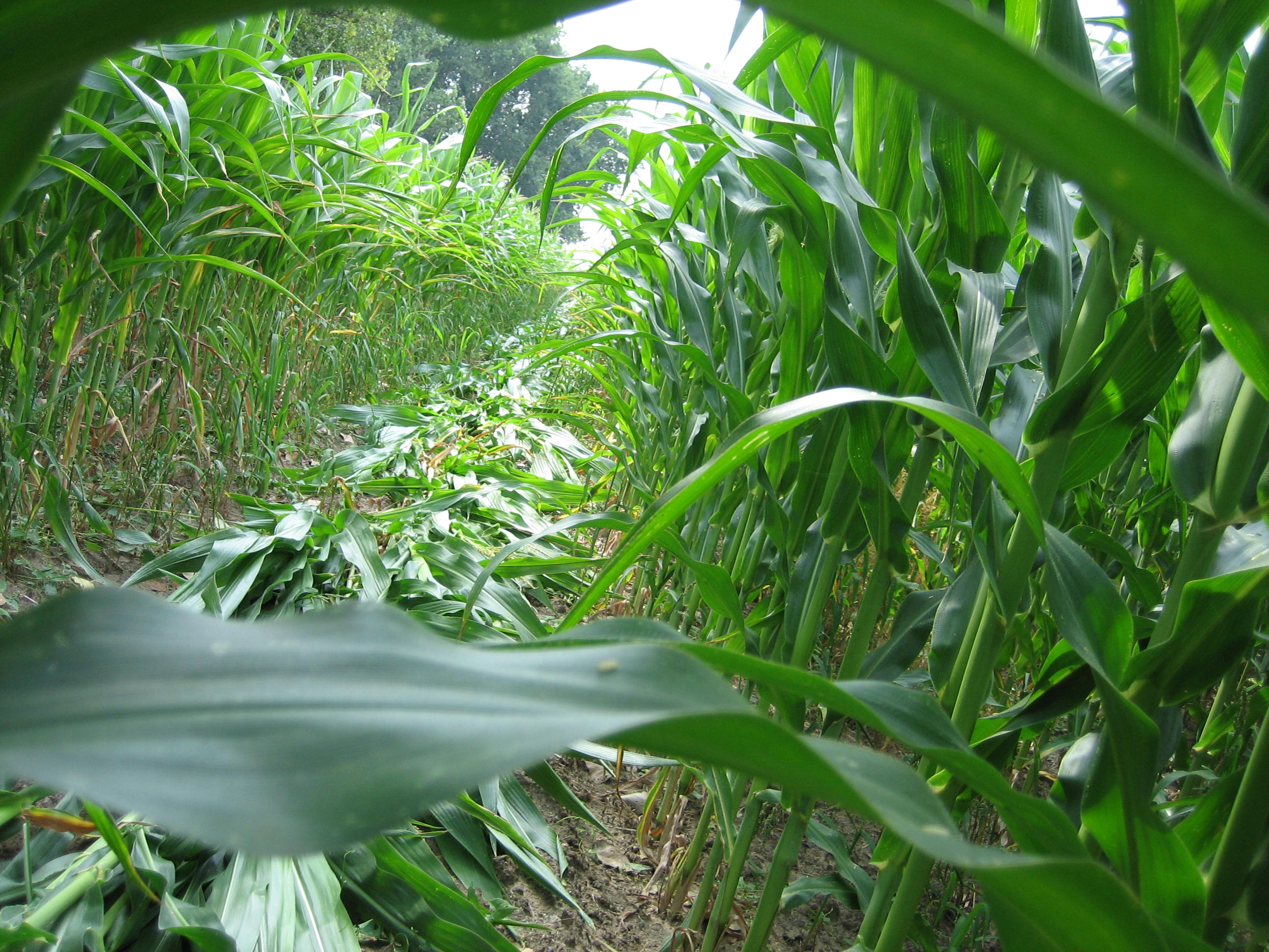 Umgetretener MON810-Genmais nach einer Feldbefreiungsaktion